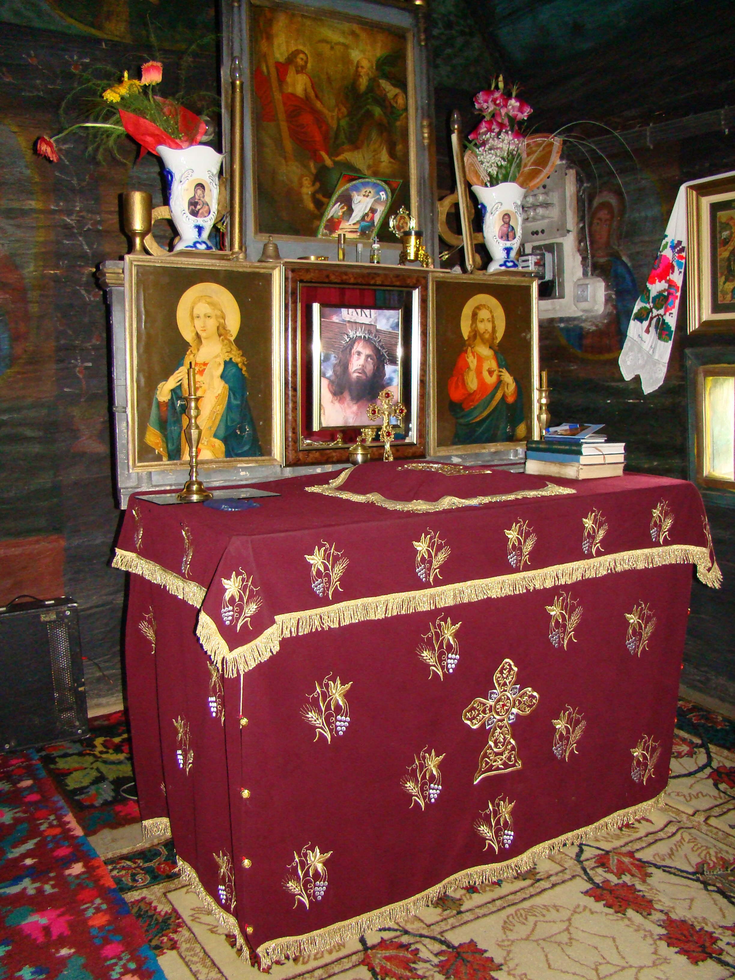 Biserica de lemn din Poiana Botizii-interioare